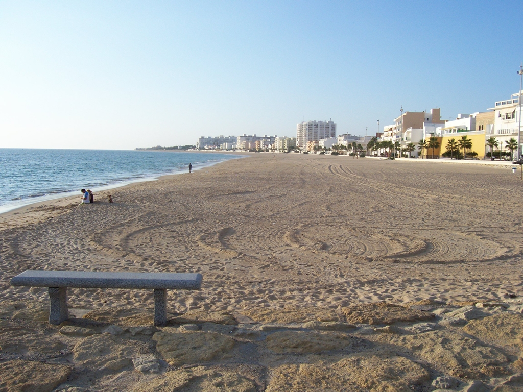 Vista general de la playa de la Costilla, en Rota-Cádiz-Andalucía-España